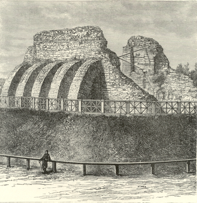 'GOLDEN GATE KIEV UKRAINE. Historic Gateway ancient wall'. 'Nouvelle Geographie Universelle La Terre et les Hommes V : L' Europe Scandinave, Russe etc.' by Jacques Elisee Reclus, published in Paris by Hachette & Cie., 1880